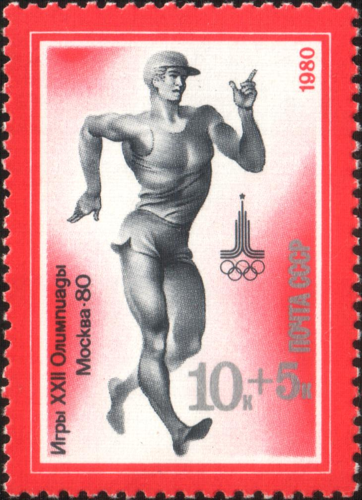 Почтовая марка СССР из серии «Игры XXII Олимпиады. Москва (19/VII—3/VIII). Легкая атлетика», выпущенная в 1980 году. На марке изображены фигура спортсмена, символизирующая спортивную ходьбу, эмблема Олимпиады. Художник — Н. Литвинов. Номер — 5041 (ЦФА). Тираж — 5 млн экз. Описание — по изданию «Почтовые марки СССР 1980: Каталог», М., Радио и связь, 1981.